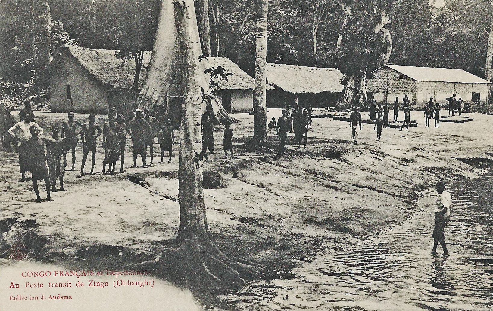 Au poste transit de Zinga (Oubanghi). Collection J. Audema. Phot. A.B. & Cie, Nancy [Albert Bergeret] Congo Français et dépendances